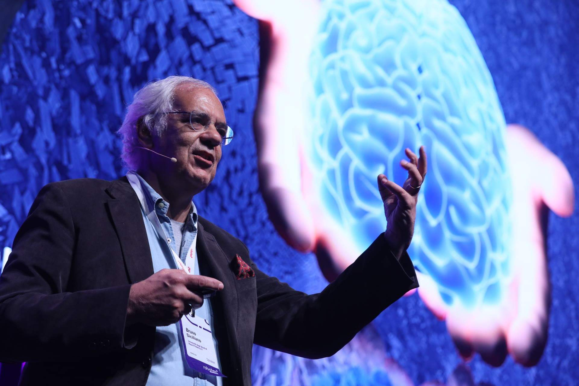 Bruno Siciliano durante la sua presentazione "Robotics for Industry 4.0" tenuta in occasione della conferenza internazionale "Robotex : Generation R" a Tallinn, il 30 novembre 2018.